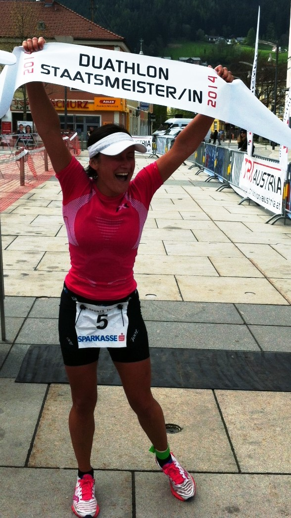 Katrin Lang beim Mürzman Extrem Duathlon. (2014)